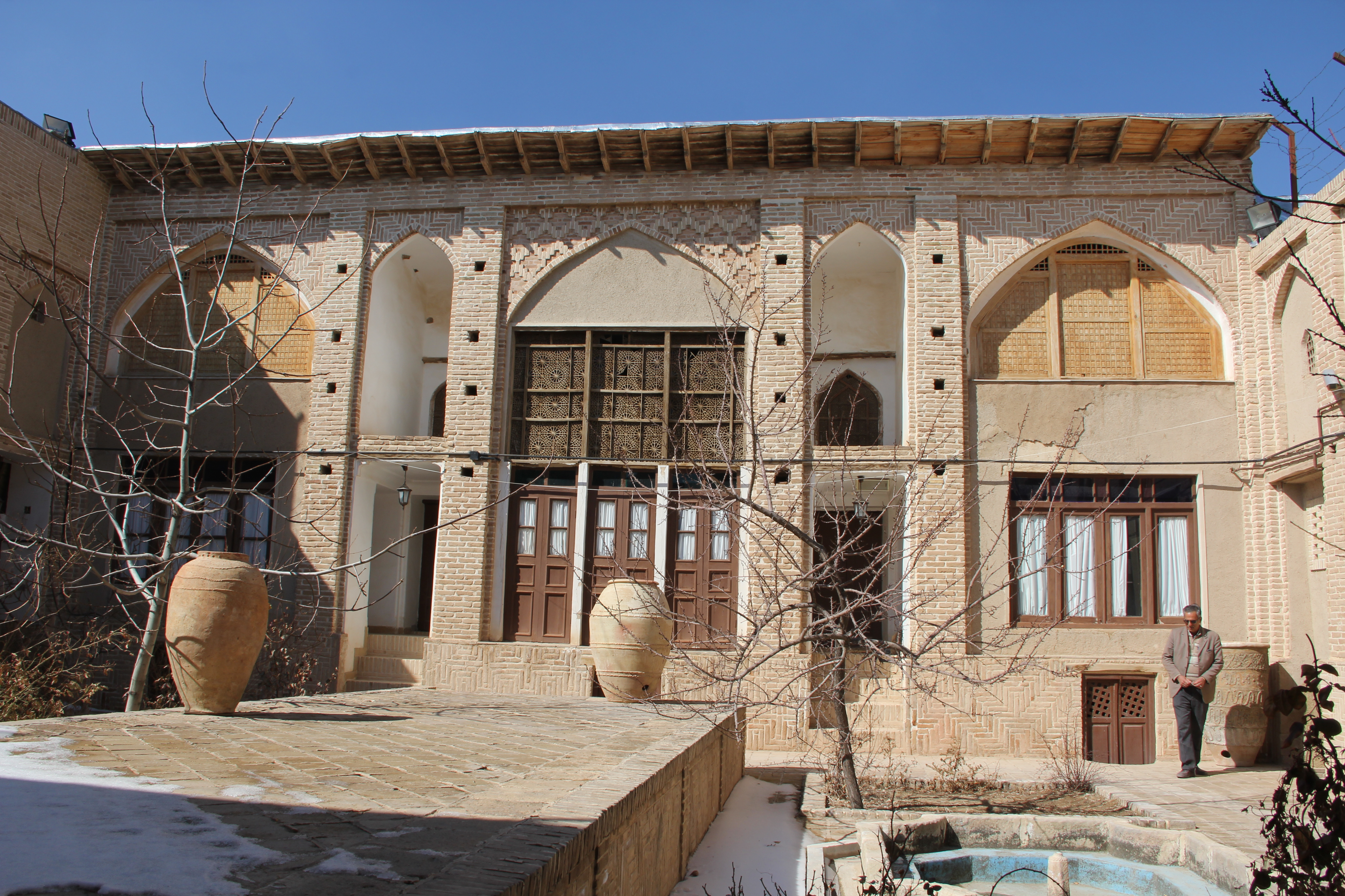 موزه آشتیان- استان مرکزی- ابنیه تاریخی- مهندس ابوالفضل بختیاری